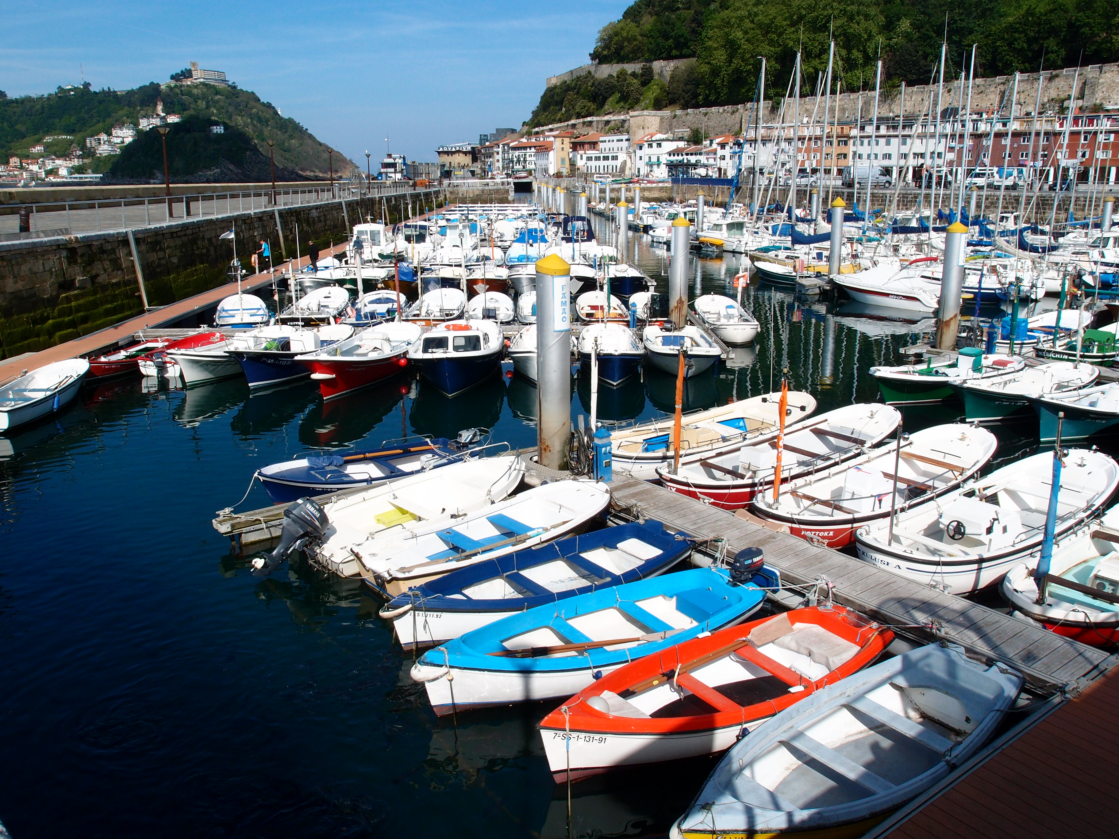 Teilansicht des Hafens von Donostia - San Sebastian Datum: 04.05.2014 Urheber: M. Pfeiffer alias Gordito1869 Quelle: Privates Fotoarchiv des Urhebers